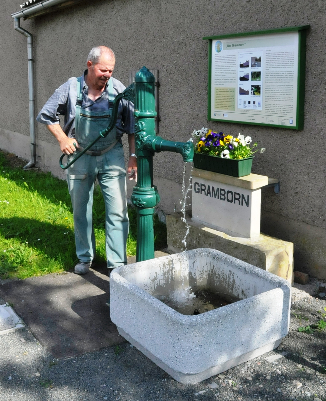 Am Gramborn pumpt der Restaurator, Dieter Hildebrandt, Wasser in den Auffangbehälter.